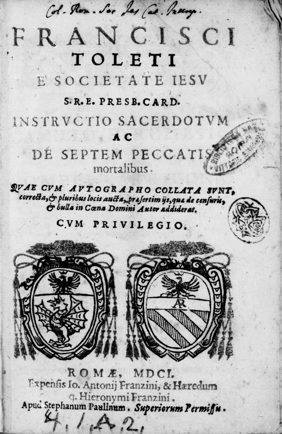 Frontespizio